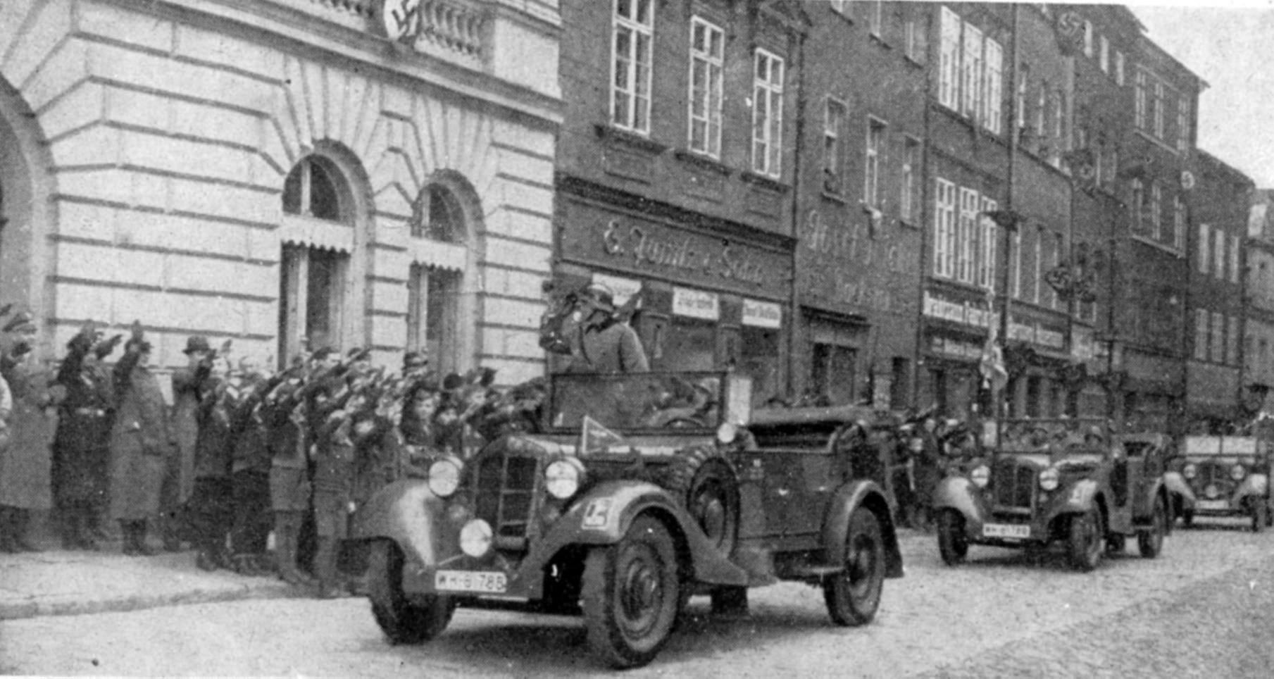 Wojskowa parada przed budynkiem Urzędu Miejskiego na rynku w Prudniku.